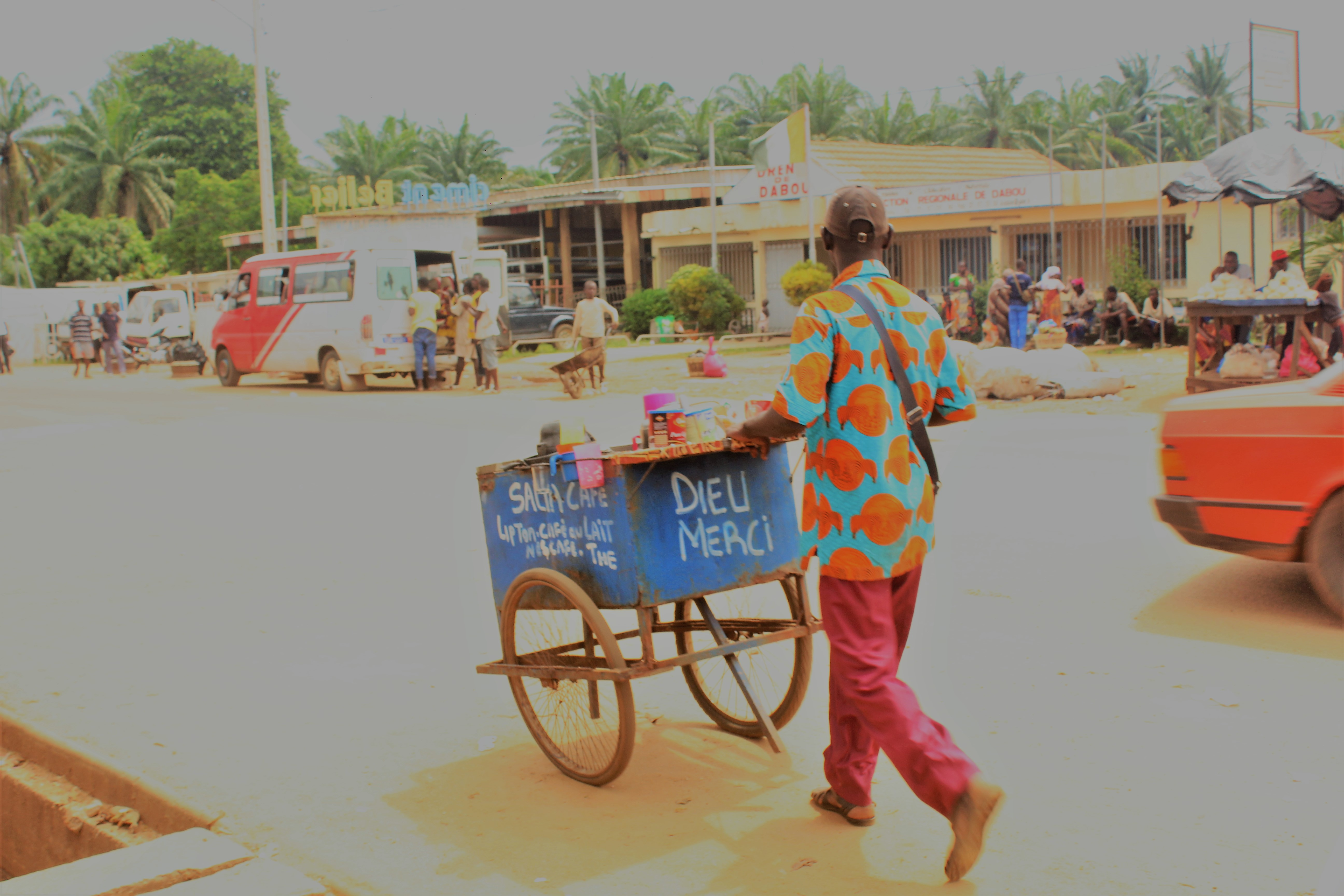 un cafetariat ambulant au jour du marché dans la ville de dabou -cote d'ivoire This is an image of "African people at work" from Ivory Coast